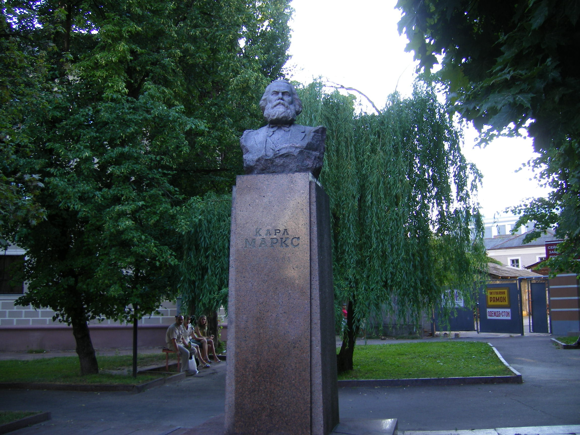 Karl Marx bust